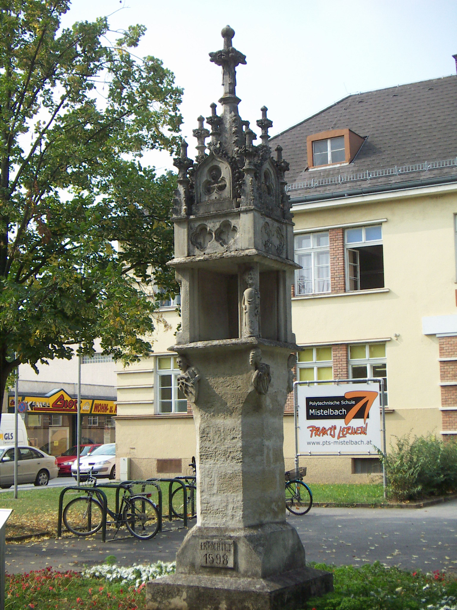 Pestsäule, gotisch, 1598 im damaligen Pestfriedhof im Bereich der Gewerbeschulgasse in Mistelbach errichtet, in Erinnerung an das Pestjahr 1597, 1898 abgetragen und am Kirchenberg aufgestellt, 1985 vor der Gewerbeschule in unmittelbarer Nähe des ehemaligen Pestfriedhofes neu aufgestellt